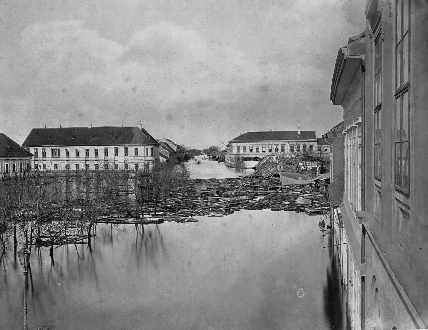 Dugonics tér a nagyárvízkor, szemben a Kálvária-sugárút. Location: Hungary, Szeged Title: Dugonics tér a nagyárvízkor, szemben a Kálvária-sugárút.